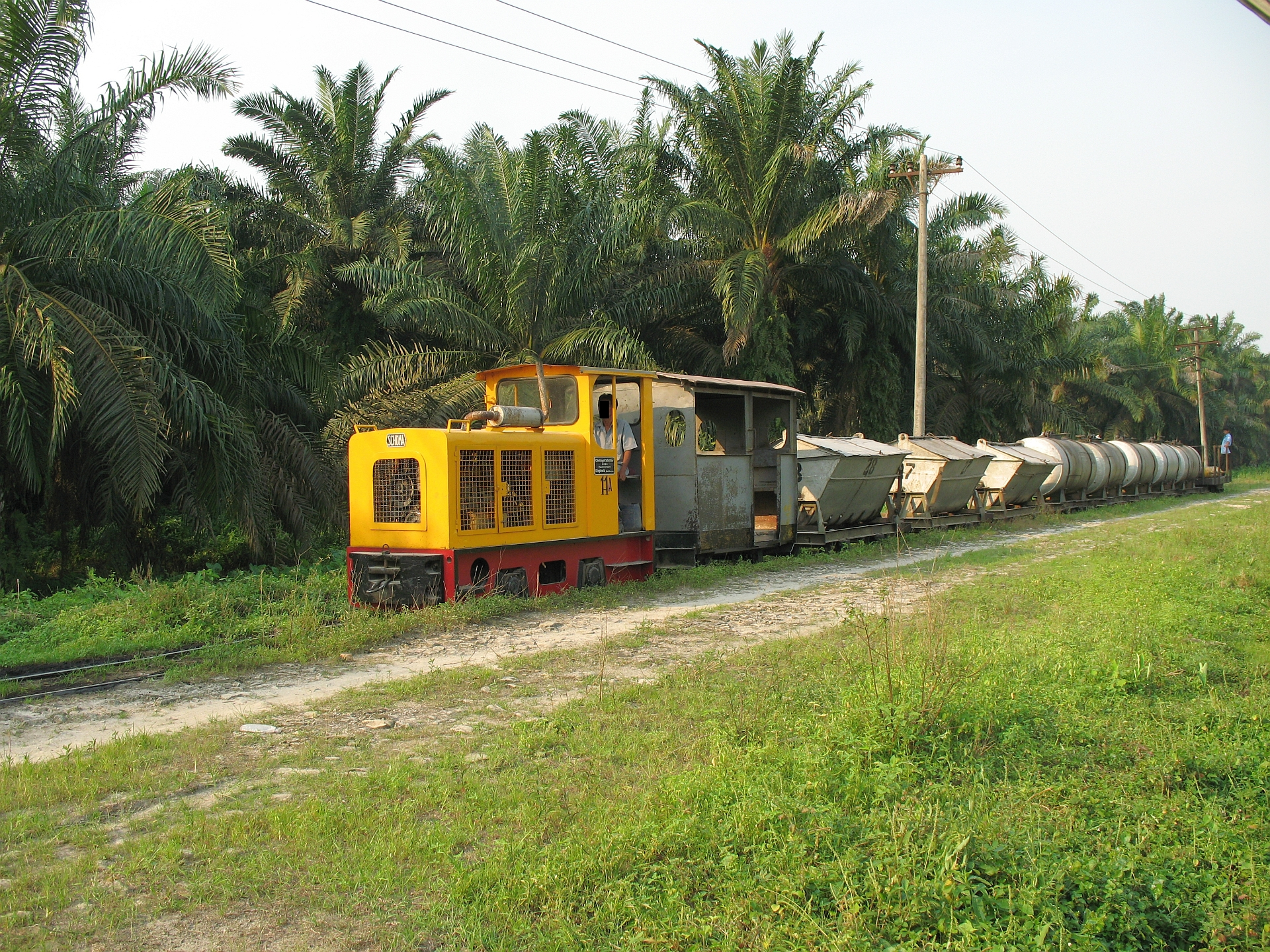 Bakrie Sumatera Plantations Railway, Bunut (Kecamatan Kota Kisaran Barat, Kabupaten Asahan, Sumatera Utara), Indonesia, 4.8.2008